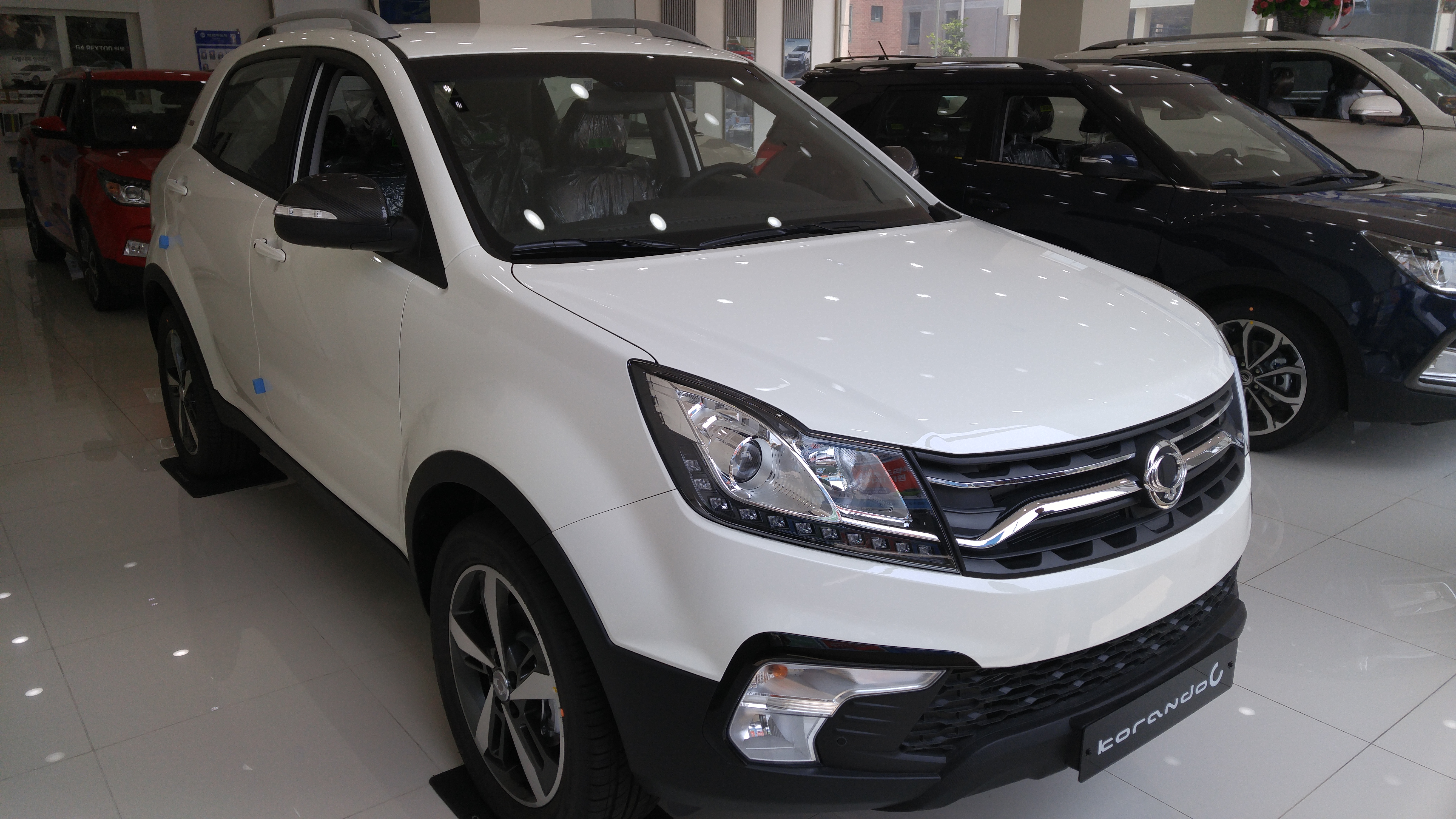 サンヨンコランド